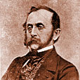 Anton Rösler (1813 - 1980), Český stavební podnikatel a politik.